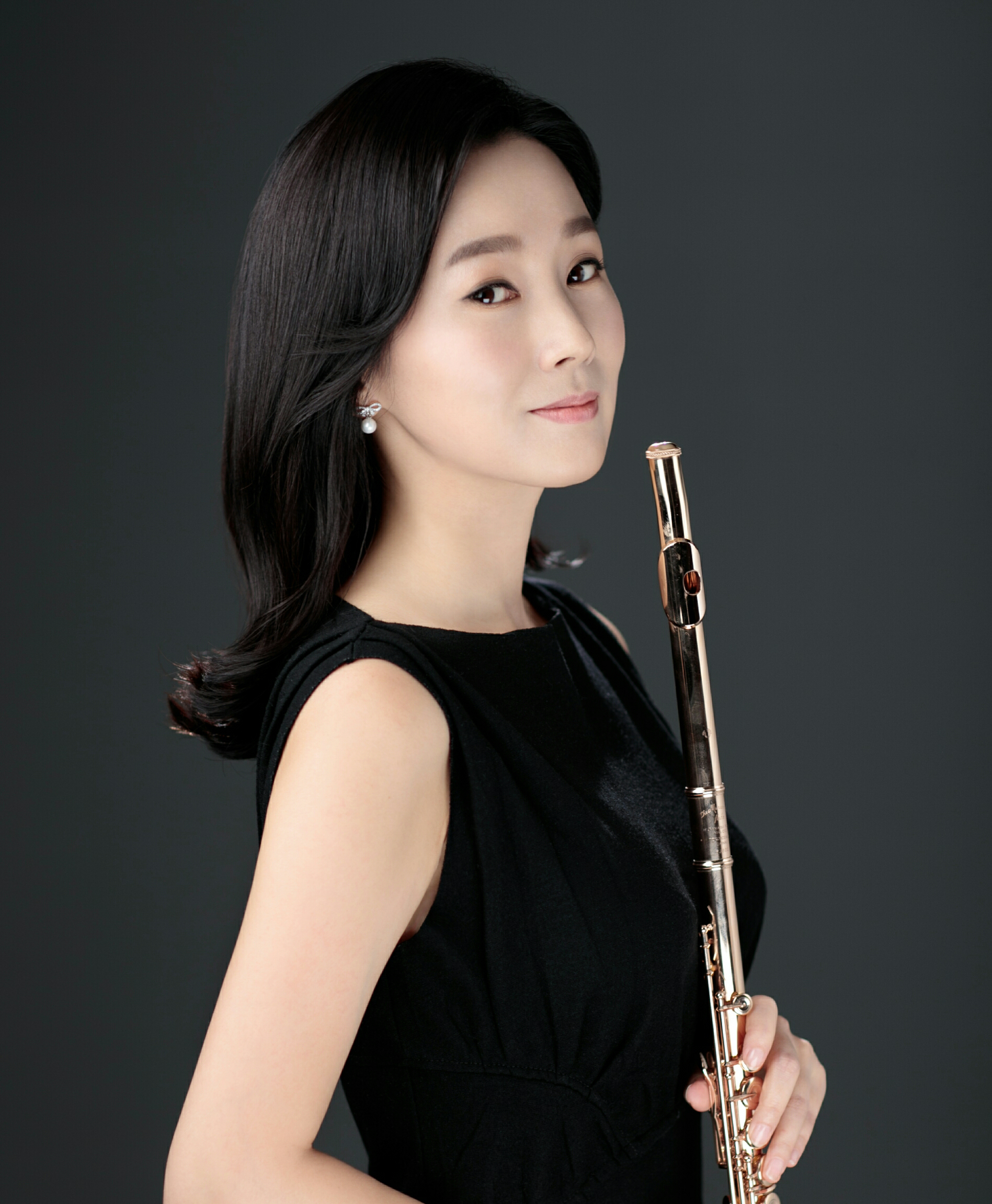 2017년 당시의 이주희